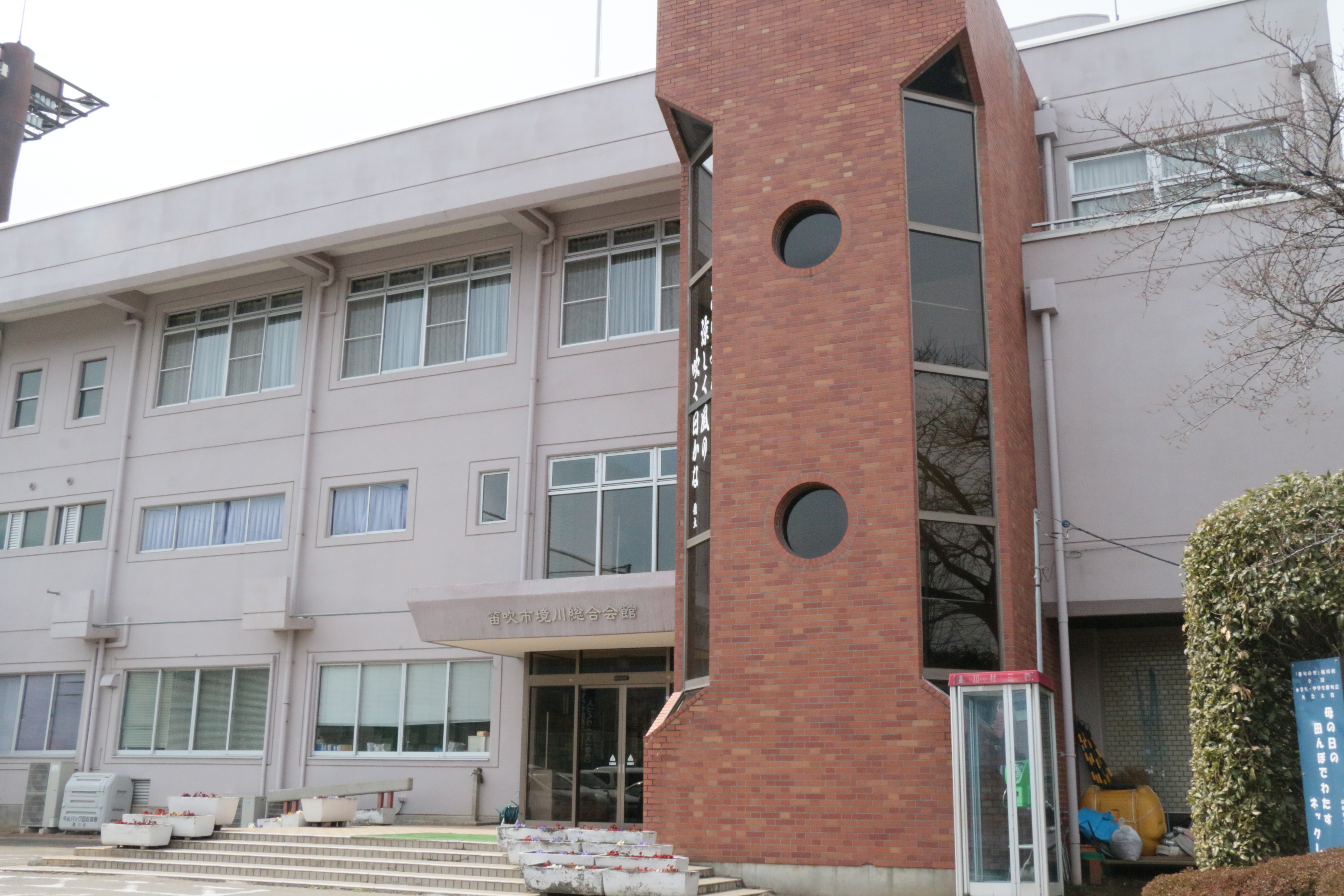 笛吹市境川図書室